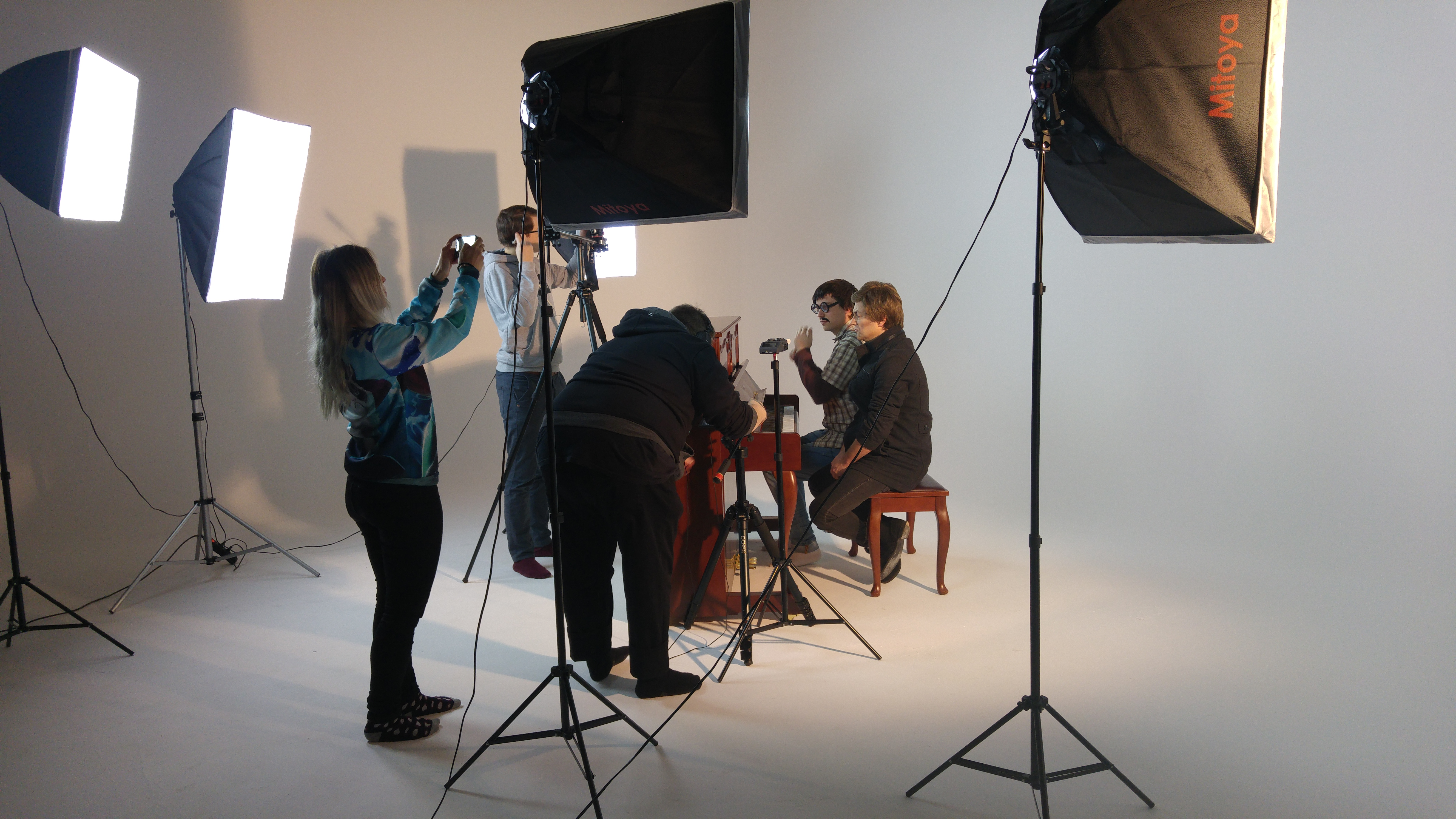 Cyber Marian i Czesław Mozil na planie spotu CASIO